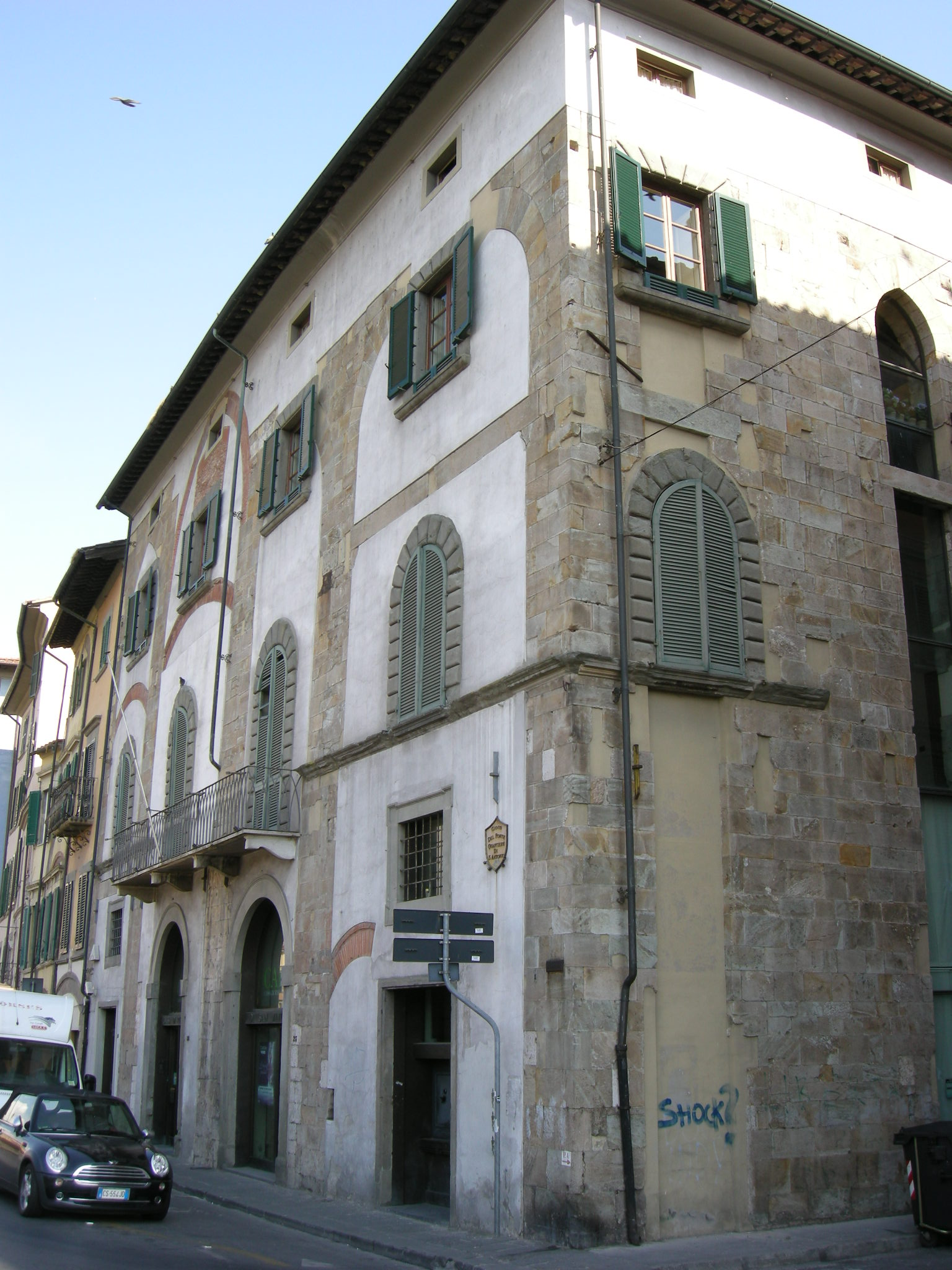 Palazzo Alliata